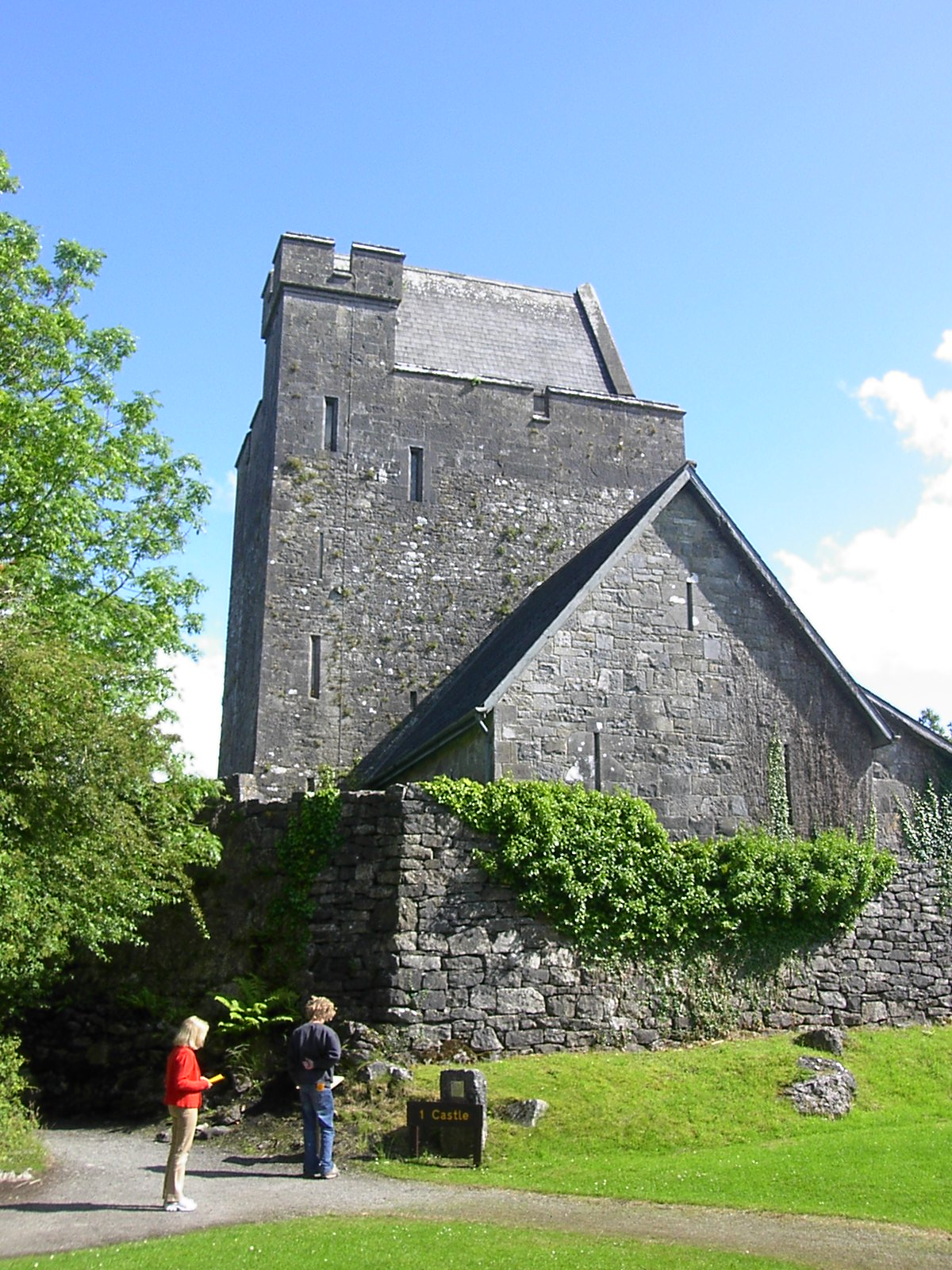 Craggaunowen Castle, County Clare, Irland